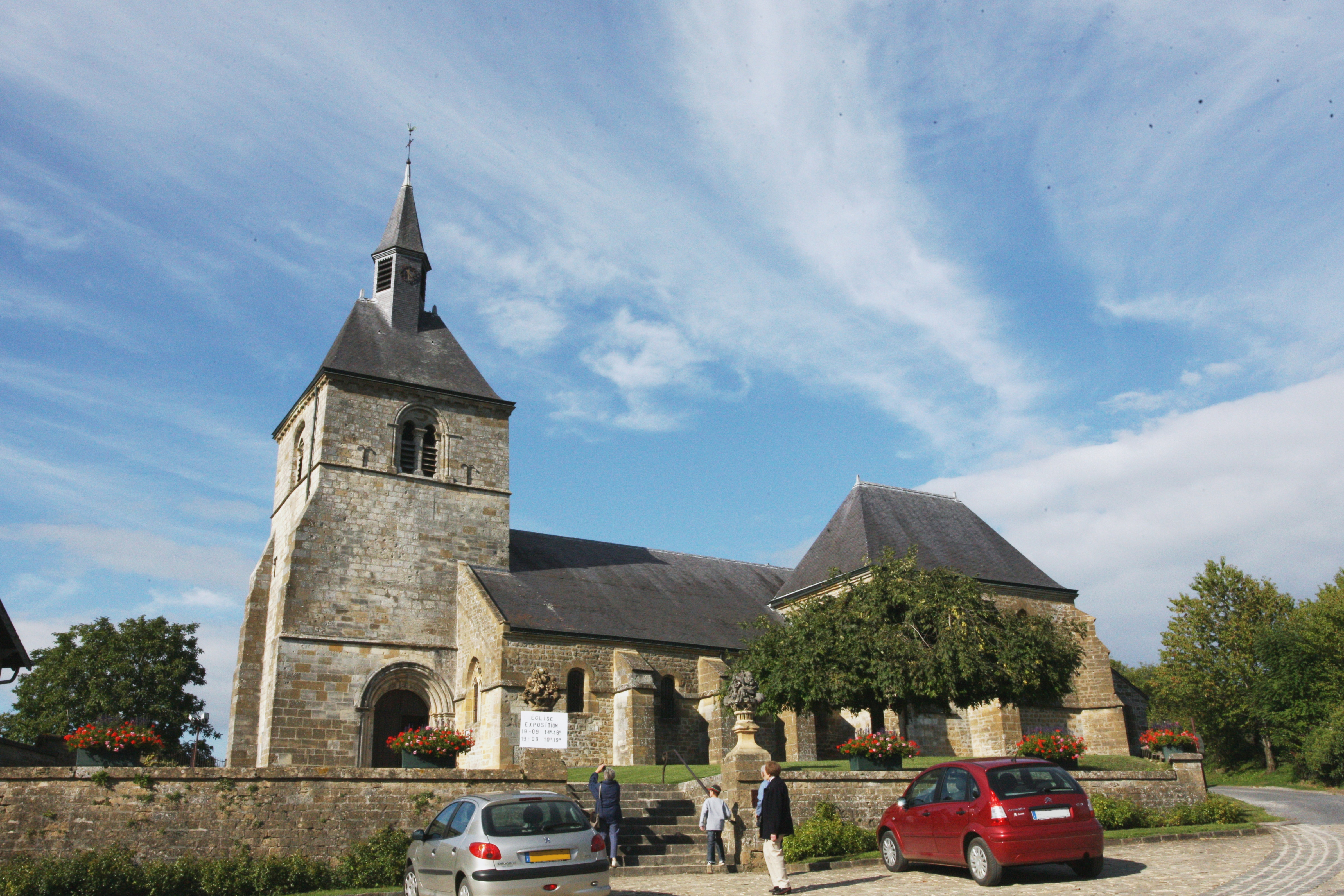 Église Saint-Sulpice de Chémery-sur-Bar (Ardennes, France) .